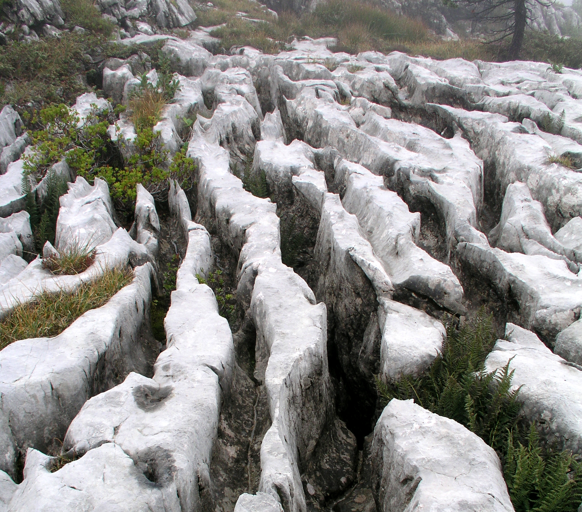 Lapiés de Innerbergli (Abkern, Bern, Suisse).